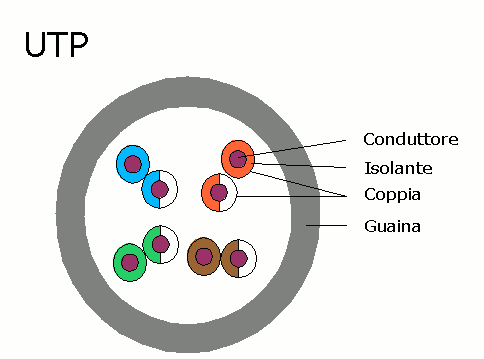 Struttura di un cavo UTP (Traduzione)